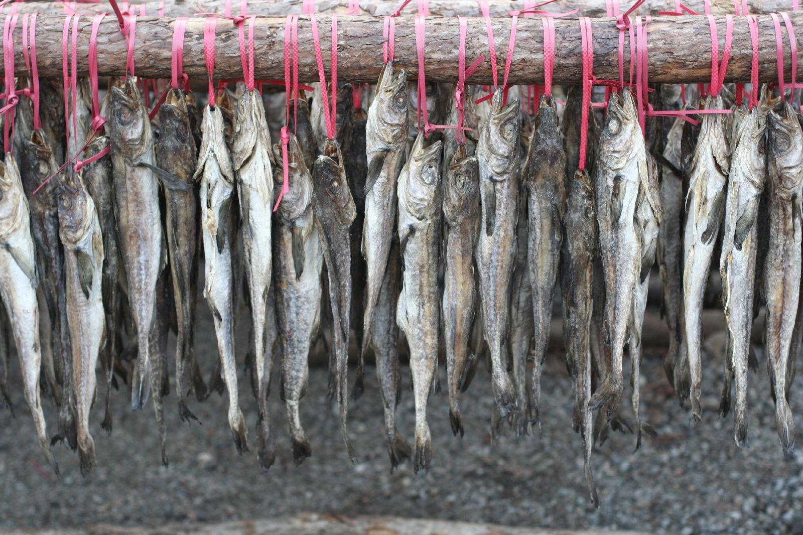 Korea-Seoraksan